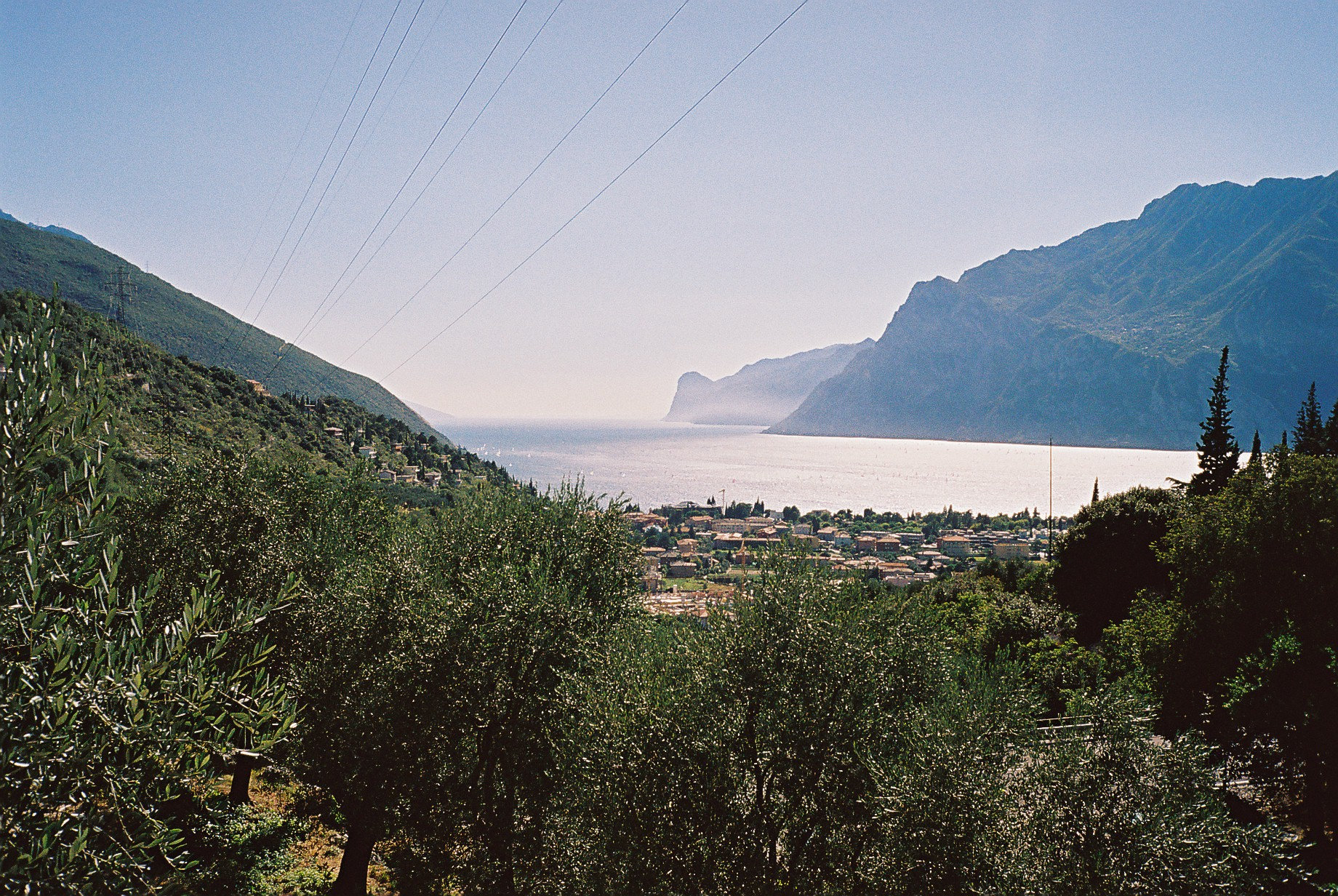 Het Gardameer aan Nago-Torbole (Trento, Italië).